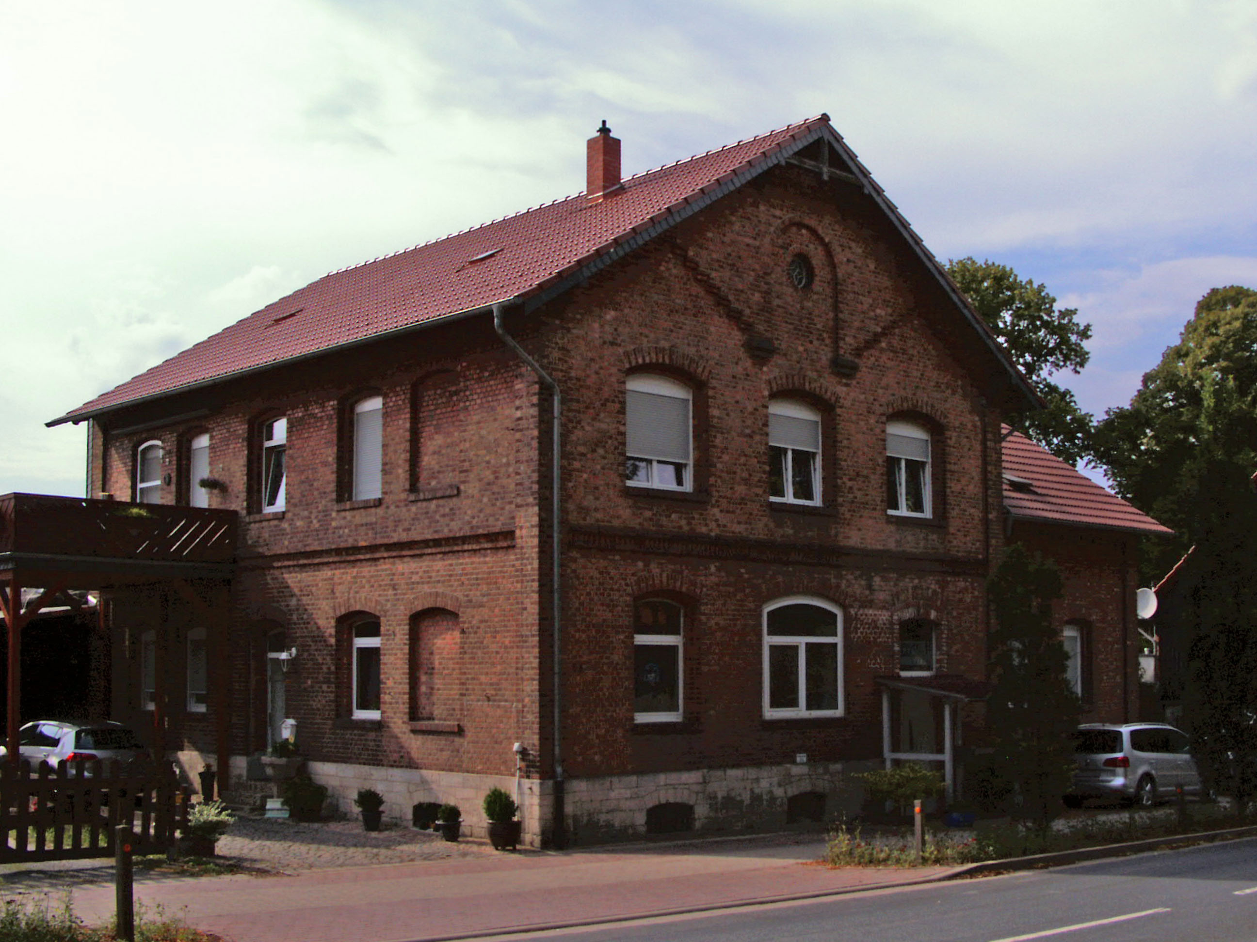 Ehemalige katholische Kirche in Woltwiesche.